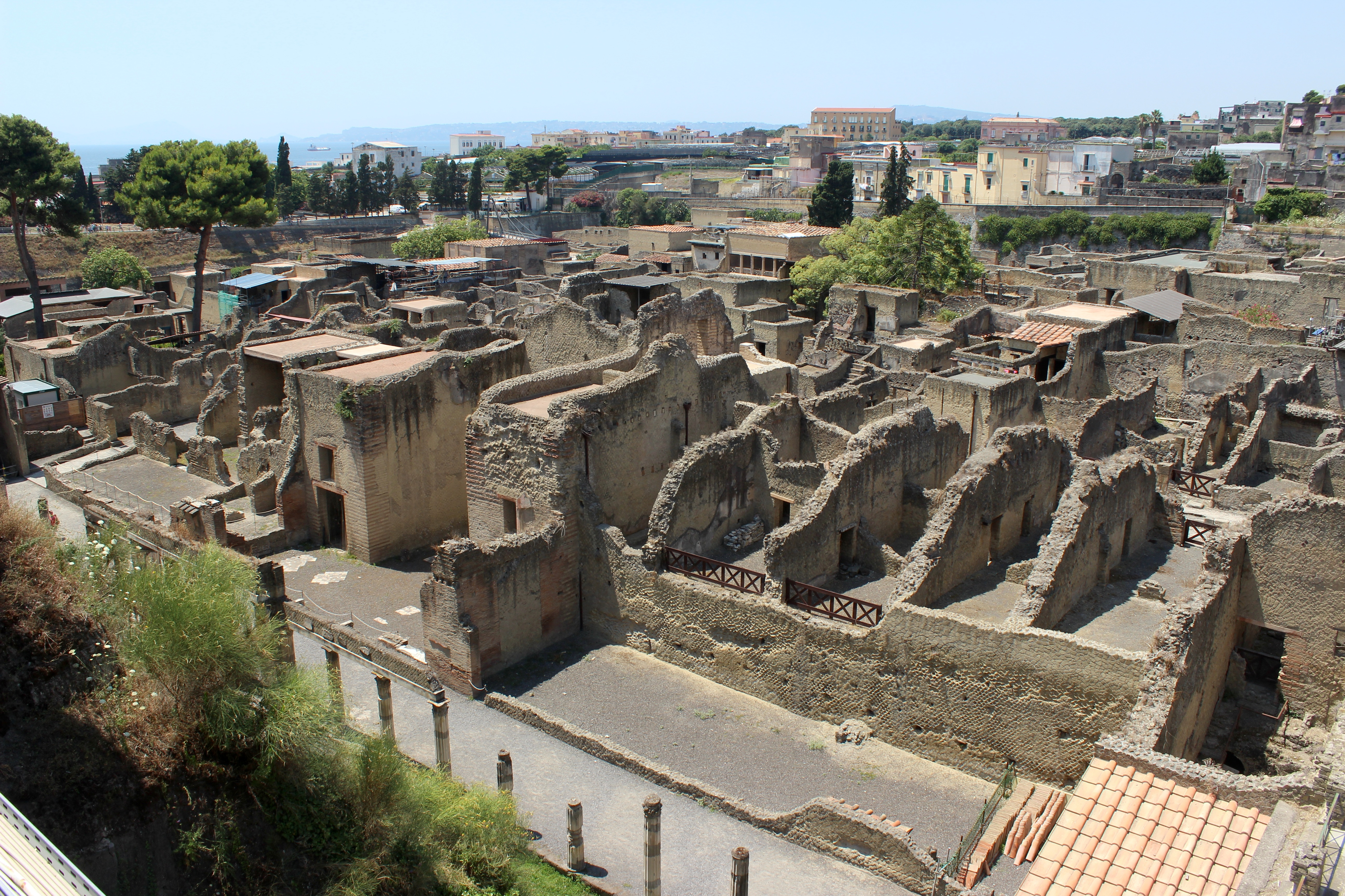 Vista de Herculano